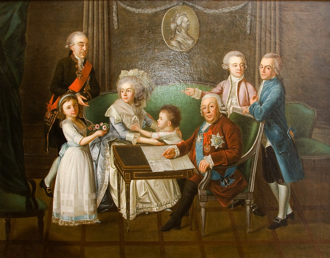 Князь Михаил Никитич Волконский и семья А. А. Прозоровского: жена Анна Михайловна (урожденная Волконская), сыновья Лев и Павел и дочери Елизавета и Анна